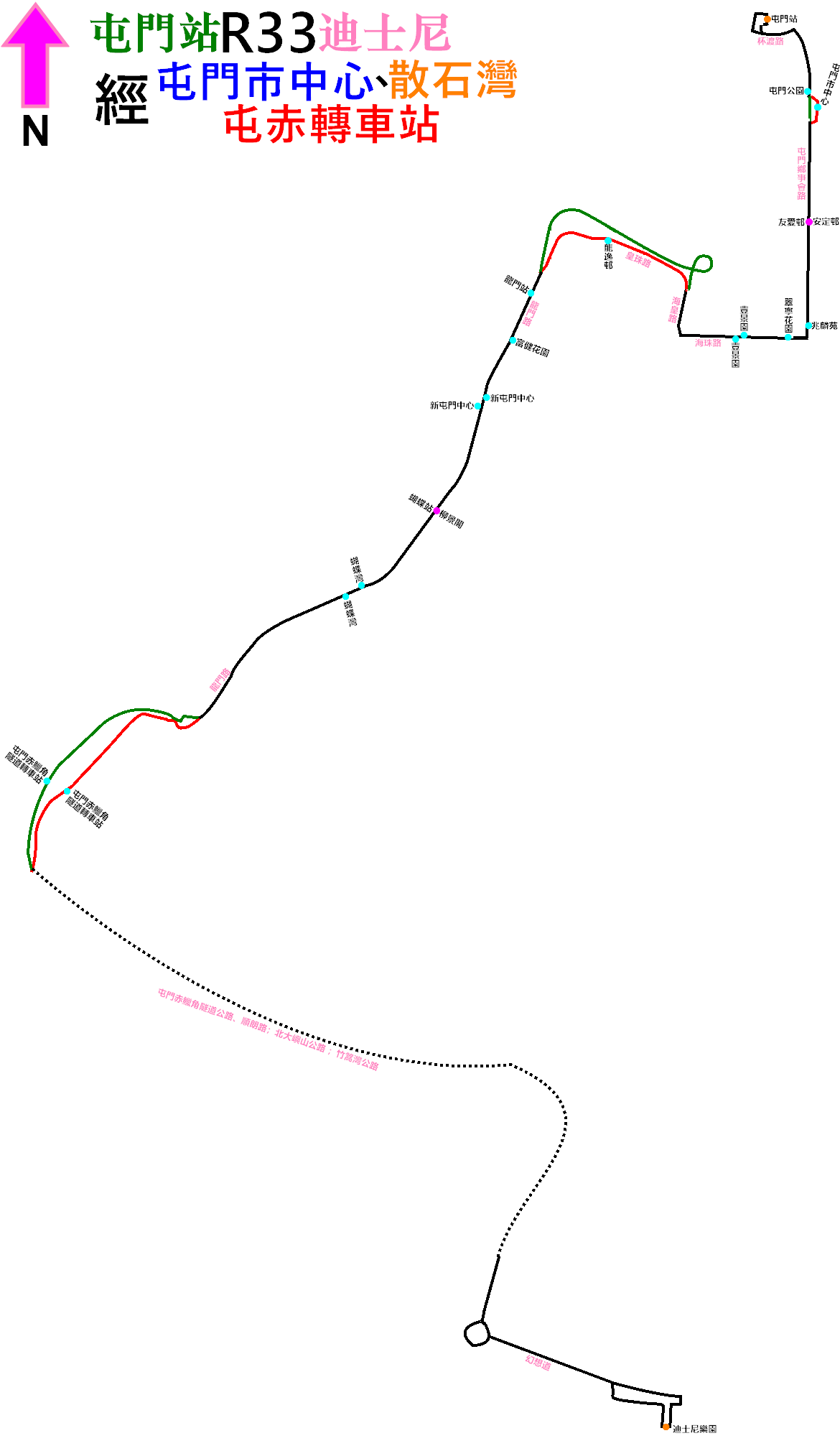 中文（香港）: 龍運巴士R33線的走線圖